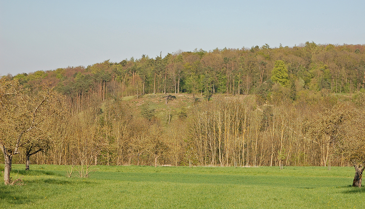 Magerrasen des Hammelrains und Rotenacker im Naturschutzgebiet Leudelsbachtal (vom Ruxart)